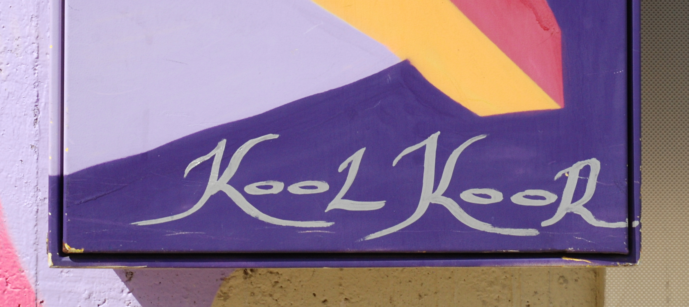 Belgique - Louvain-la-Neuve - voie des Hennuyers - Ascenseur menant vers les quais de la gare (Kosmopolite Art Tour 2015 à Louvain-la-Neuve, signature de Kool Koor, disparue entre avril et août 2018)